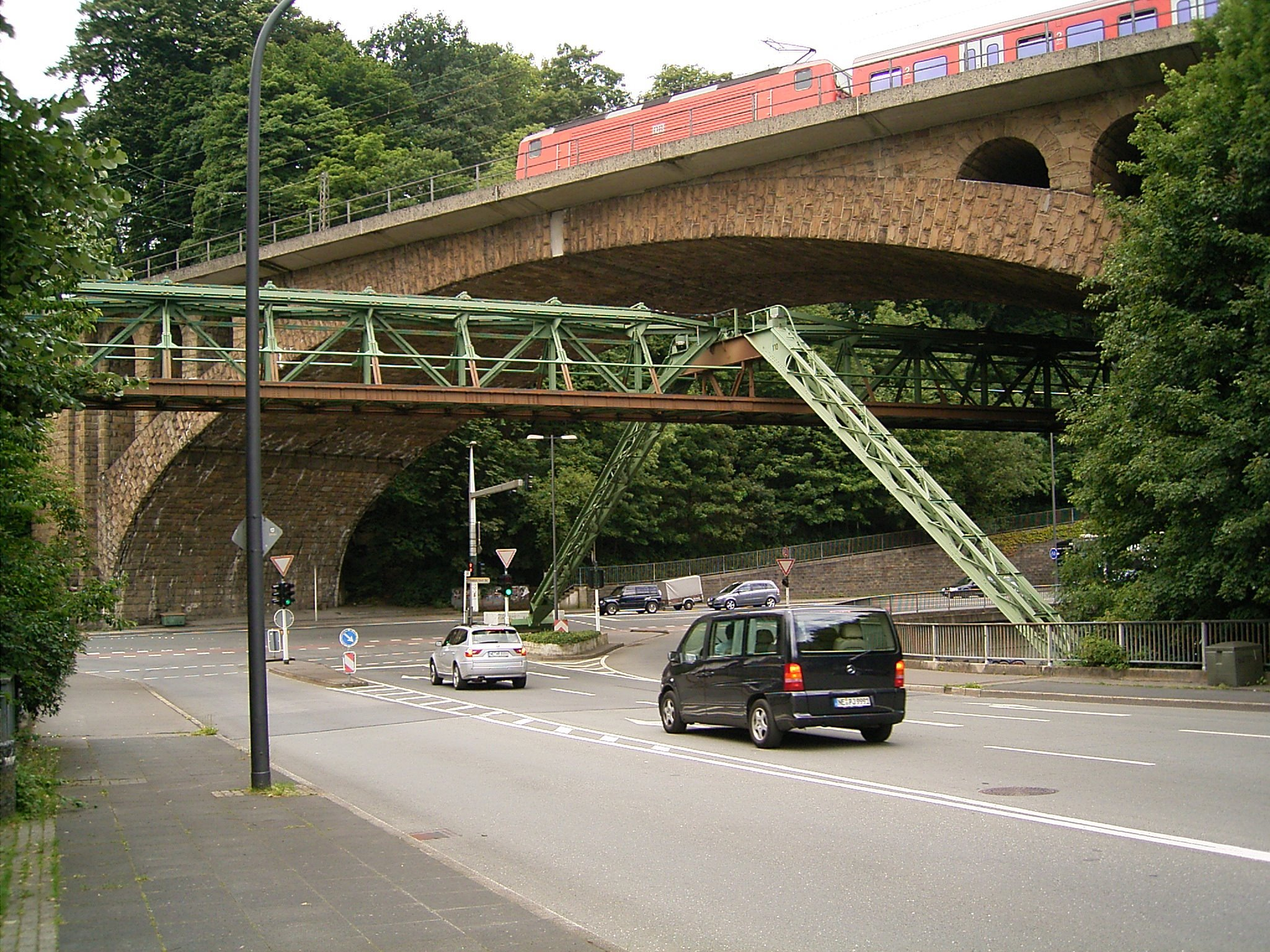 Sonnborner Eisenbahnbrücke und Wupperbrücke Siegfriedstraße in Wuppertal